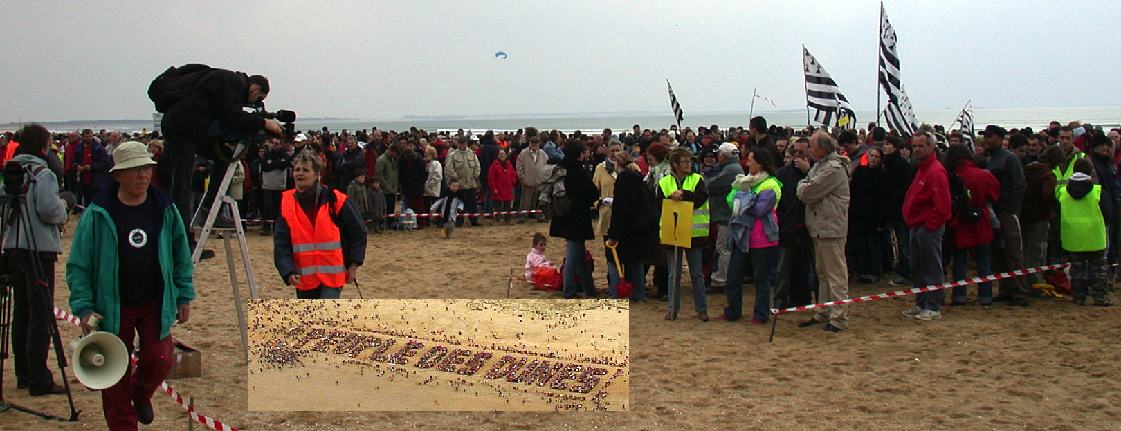 Le Peuple des dunes sur la plage à Erdeven mise en place des lettres de la fresque humaine (en inclusion)